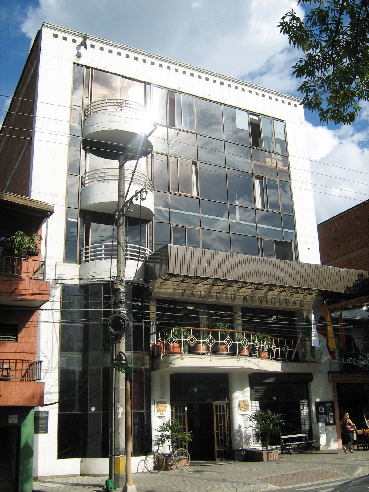 Alcaldia de Sabaneta